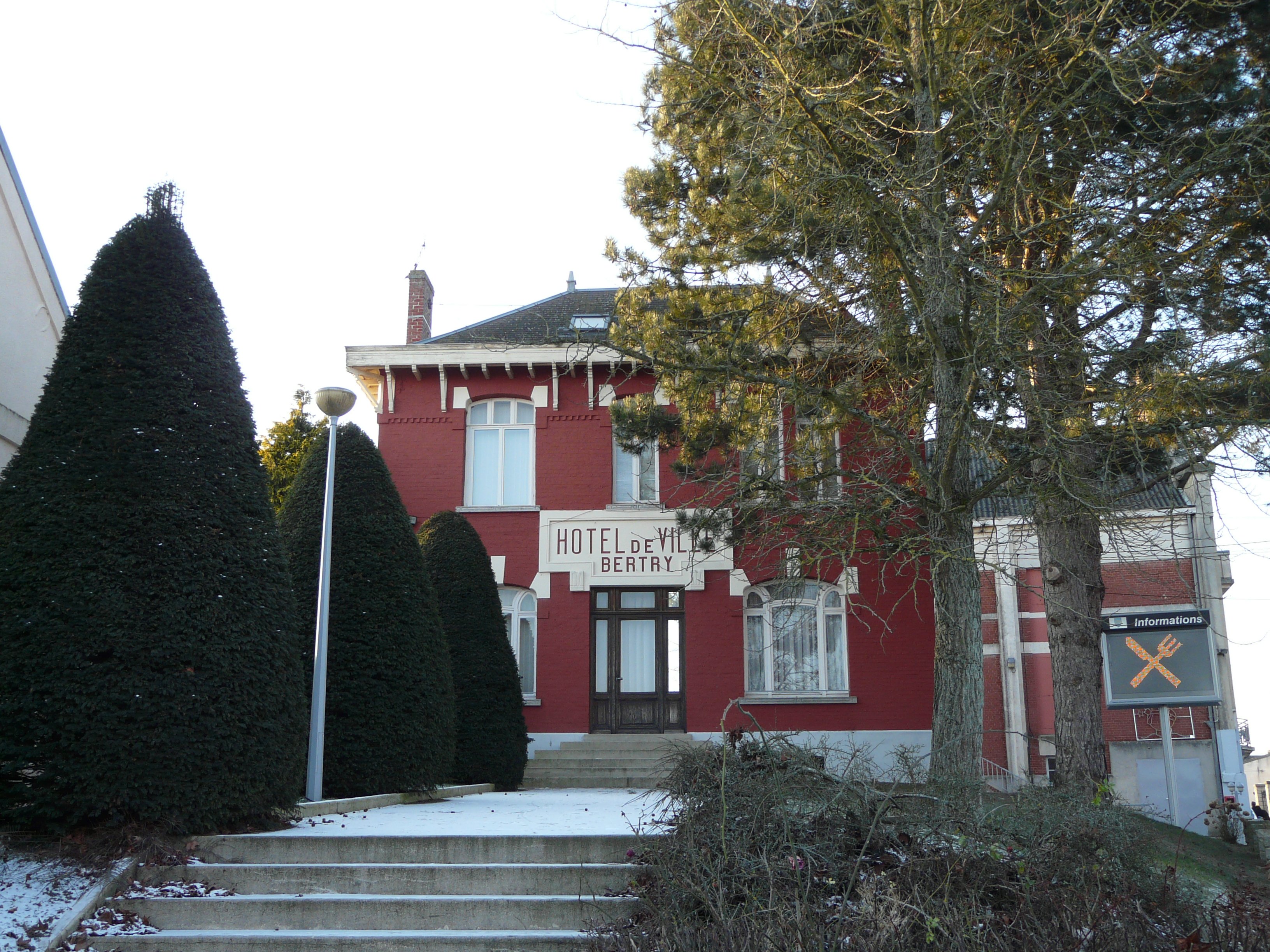 La mairie de Bertry